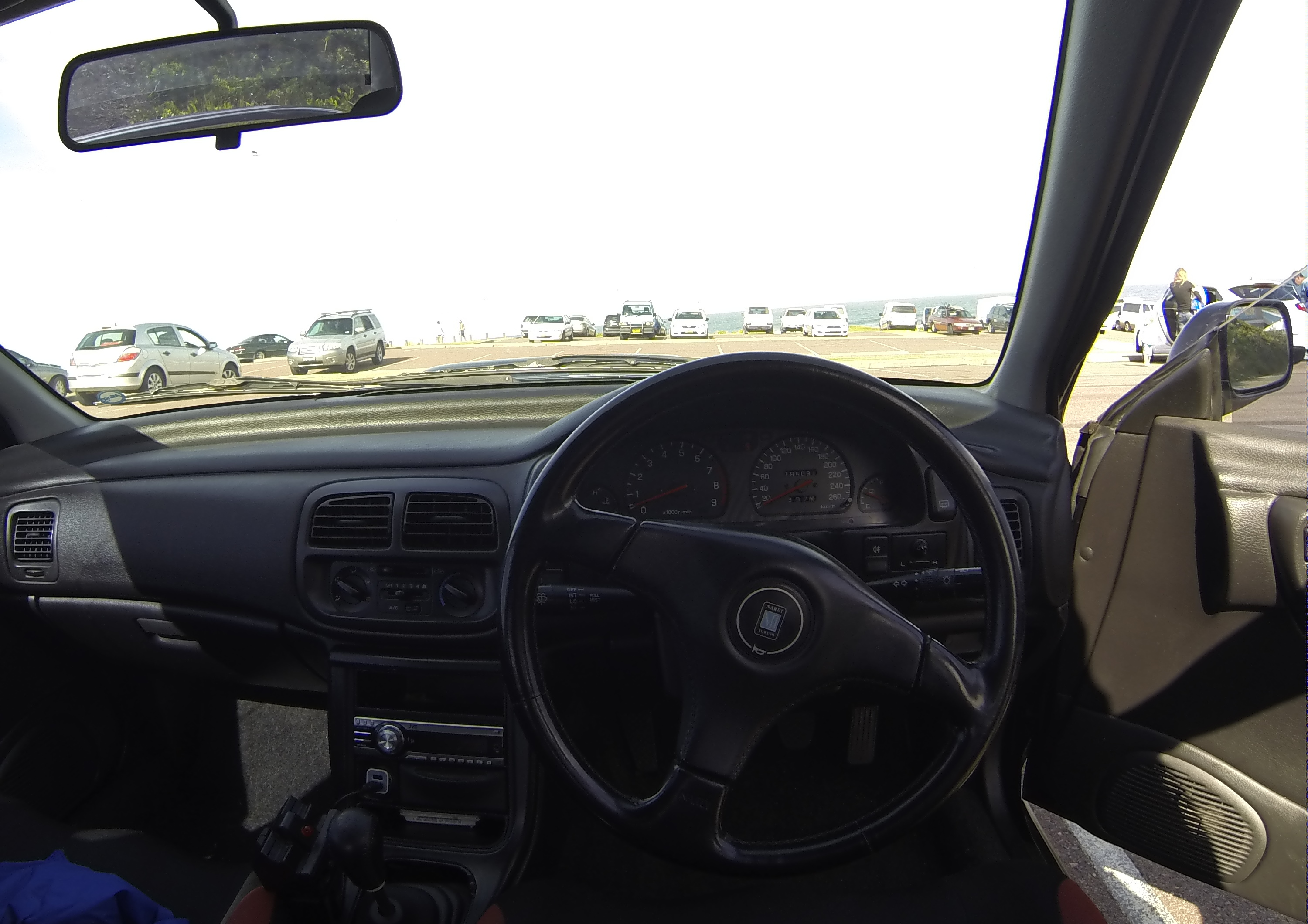 1997 Subaru Impreza WRX